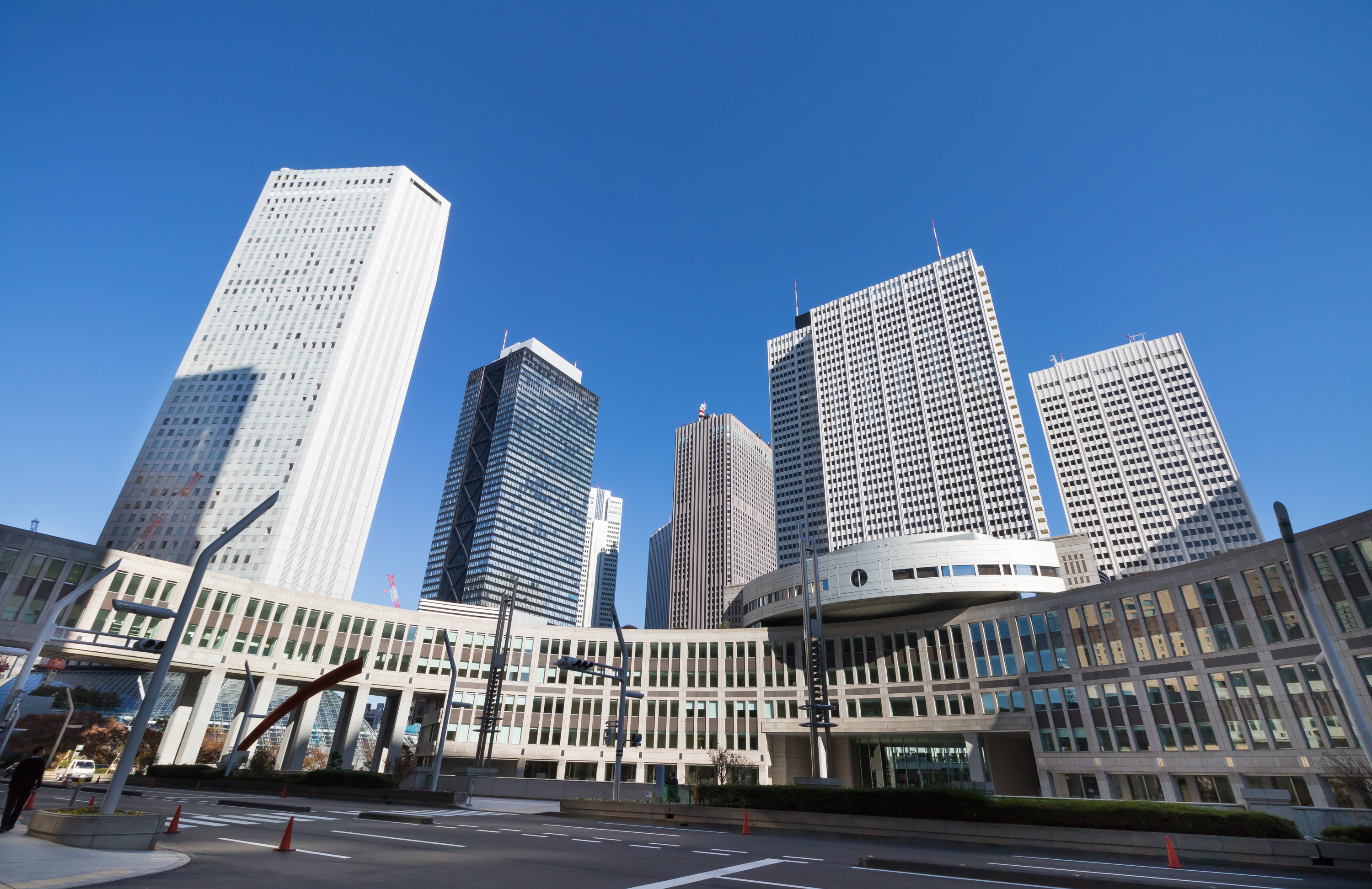 東京都議会議事堂からのビル群。